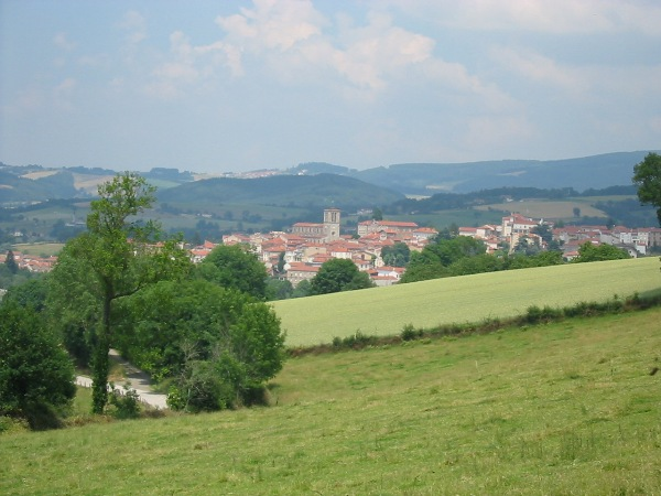 Paysage aux alentours de Panissières